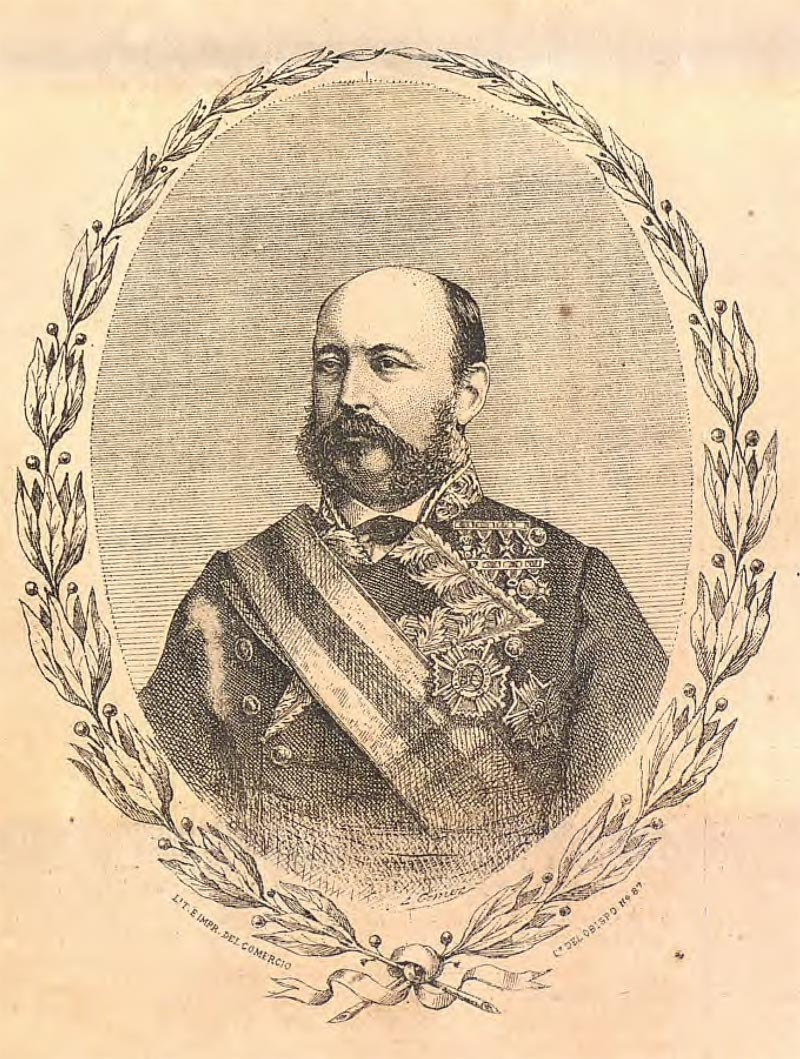 Retrato del general Buenaventura Carbó y Aloy, publicado en El Moro Muza, 26 de junio de 1870, página 1